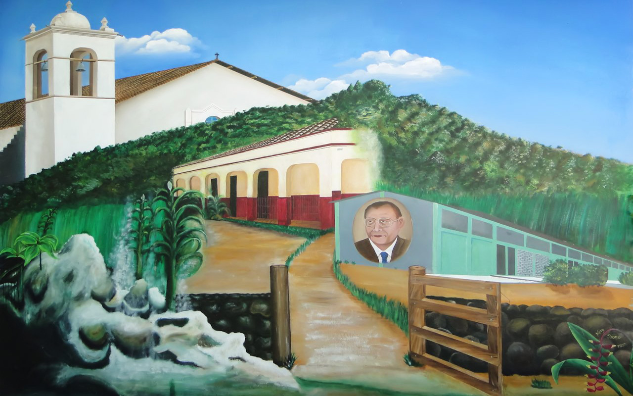 Mural al Fresco, Instituto Hector Orlando Gómez Cisneros; Magdalena, Intibucá.